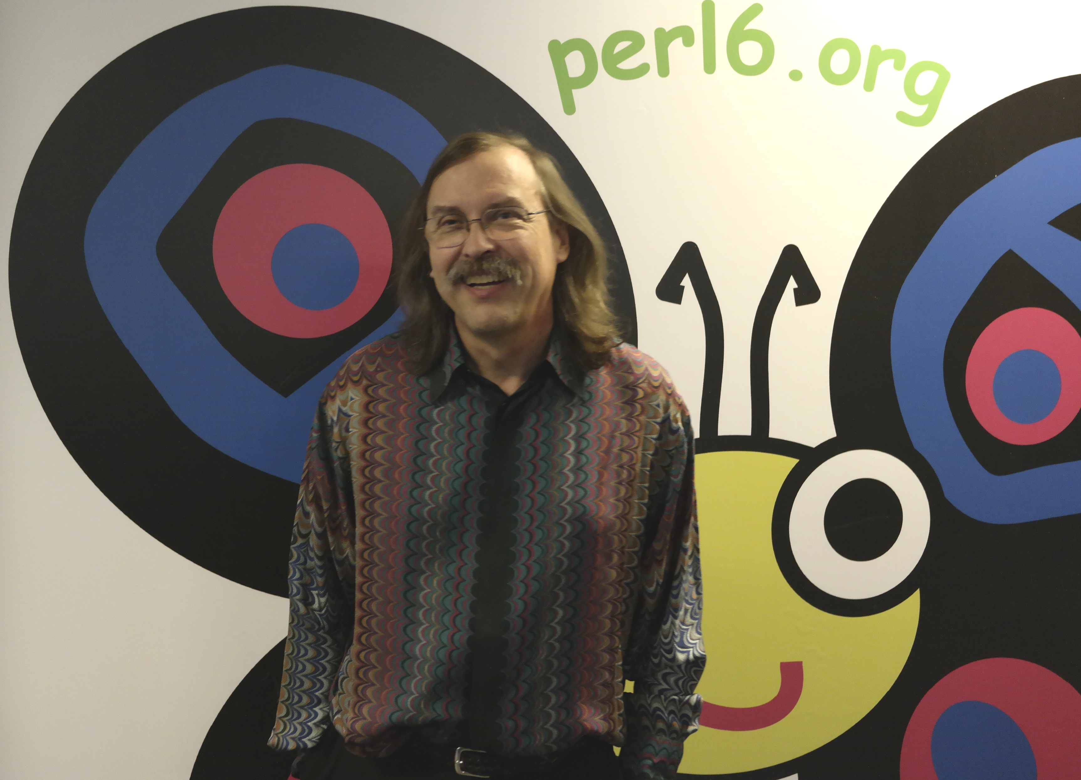 Larry Wall, twórca języka Perl, FOSDEM 2015